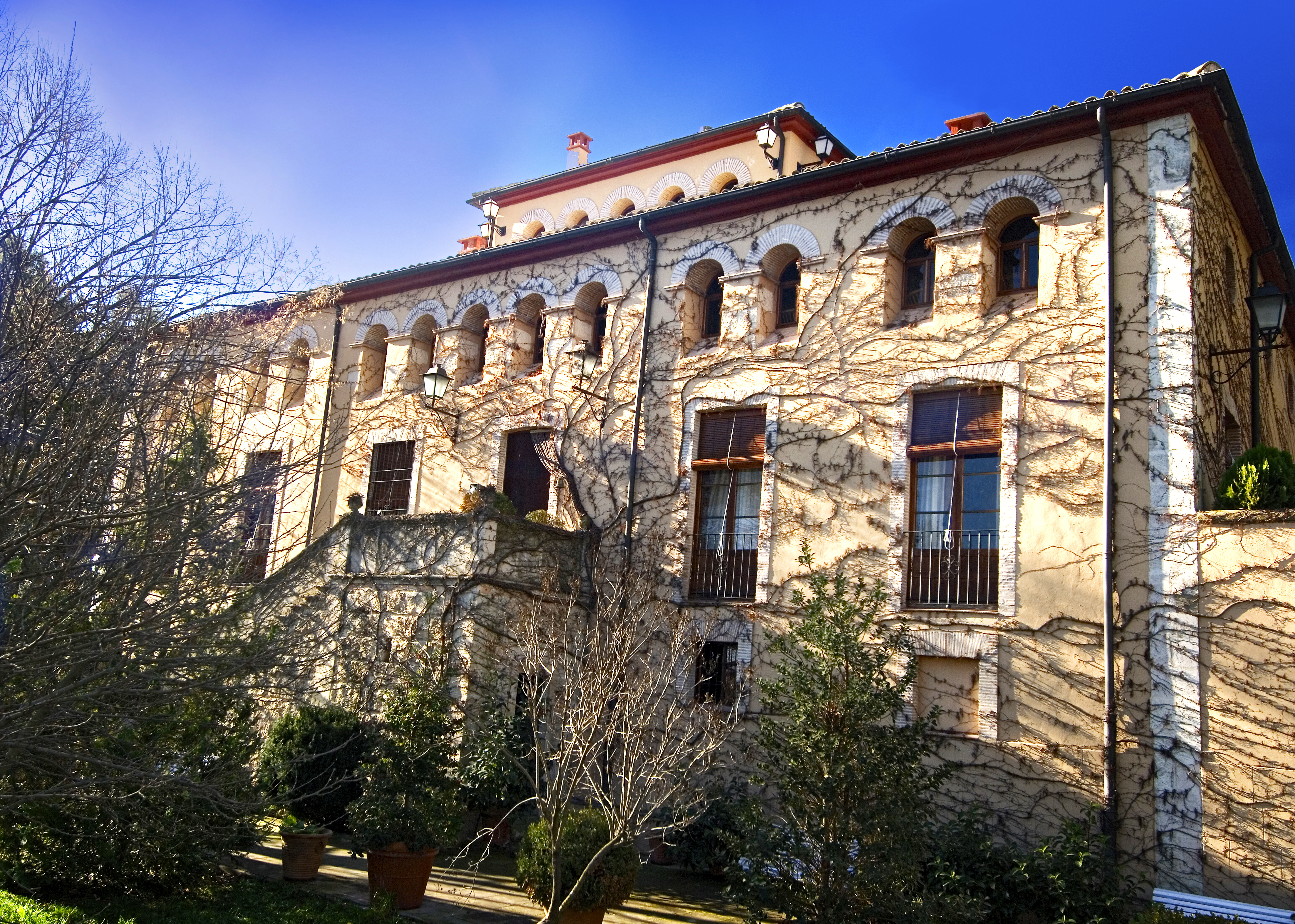 Masía el Altet Finca